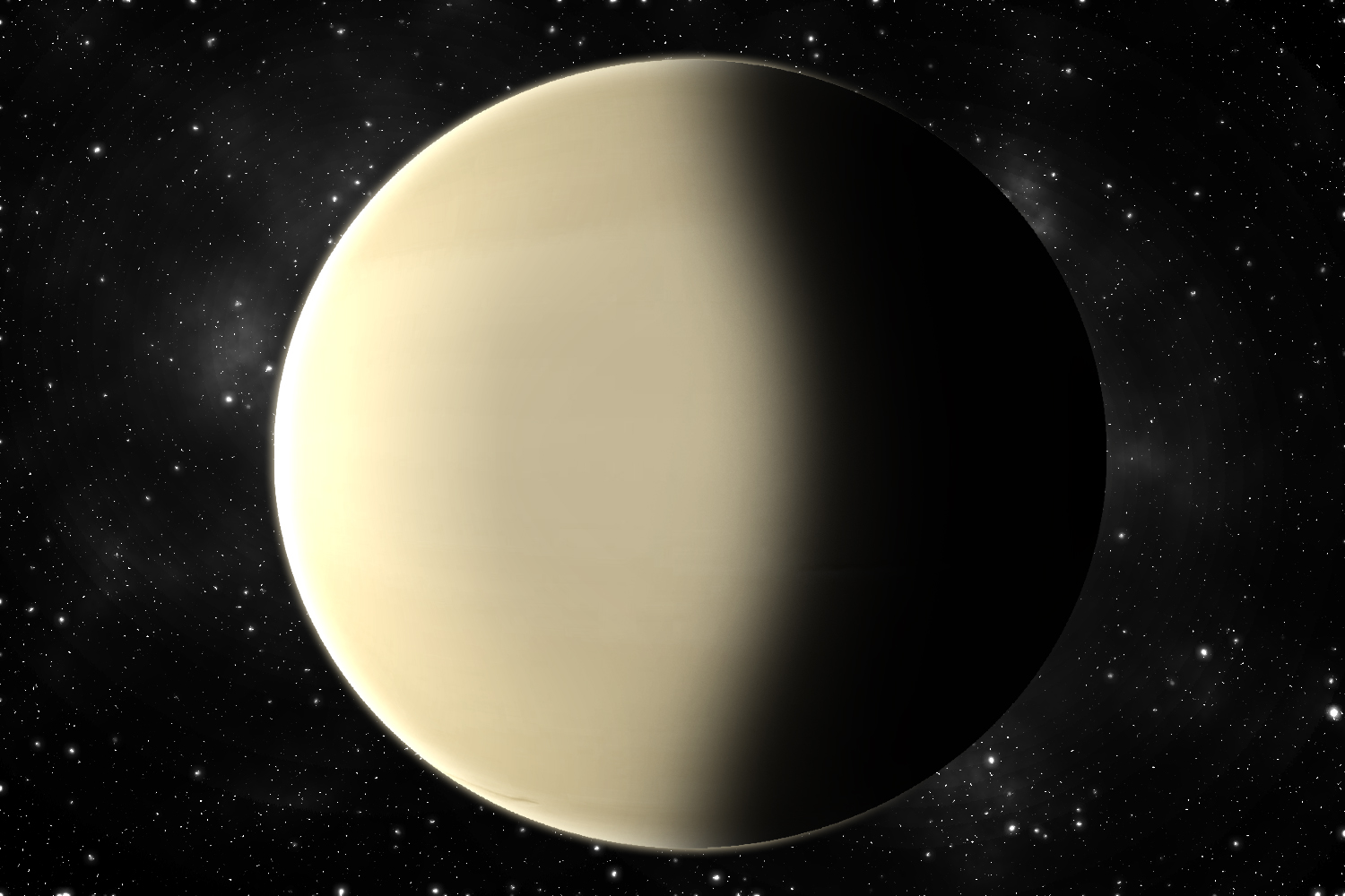 Impresión artística de Kepler-440b